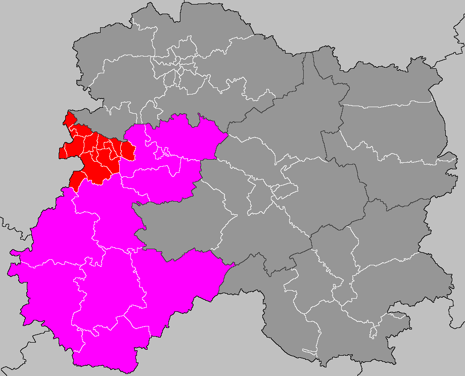 Localisation du canton de Dormans